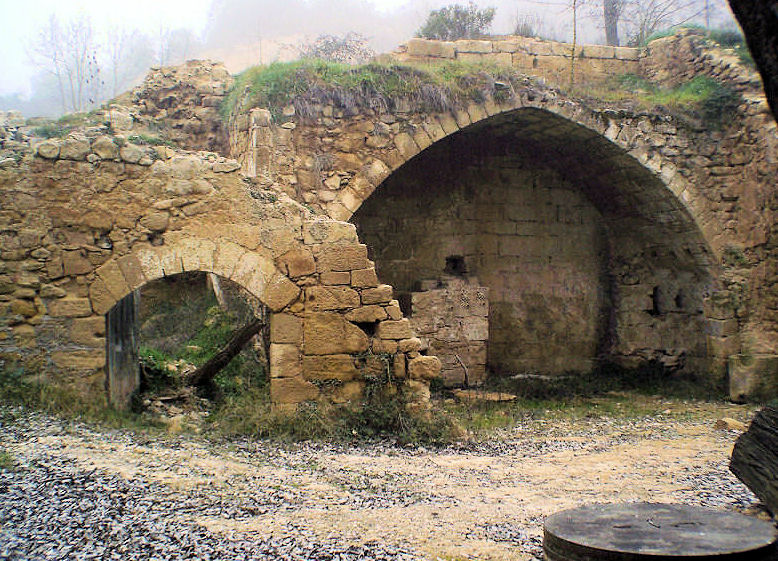 Molí fariner de les Besses a Cervià de les Garrigues